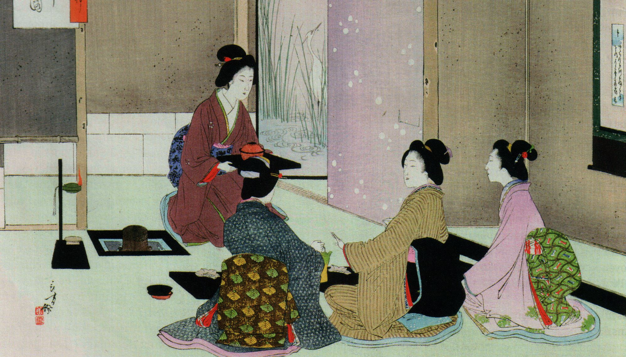 「茶の湯日々草」より 『会席の図』、木版画